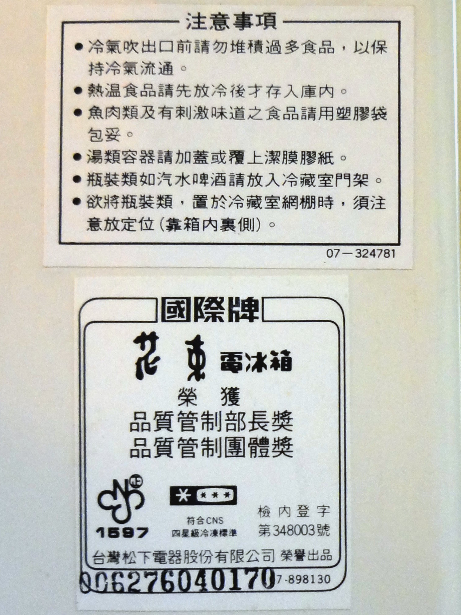 中文（台灣）: 台灣松下電器國際牌花束電冰箱NR-620MA注意事項與序號標籤，貼在下層內部右側。